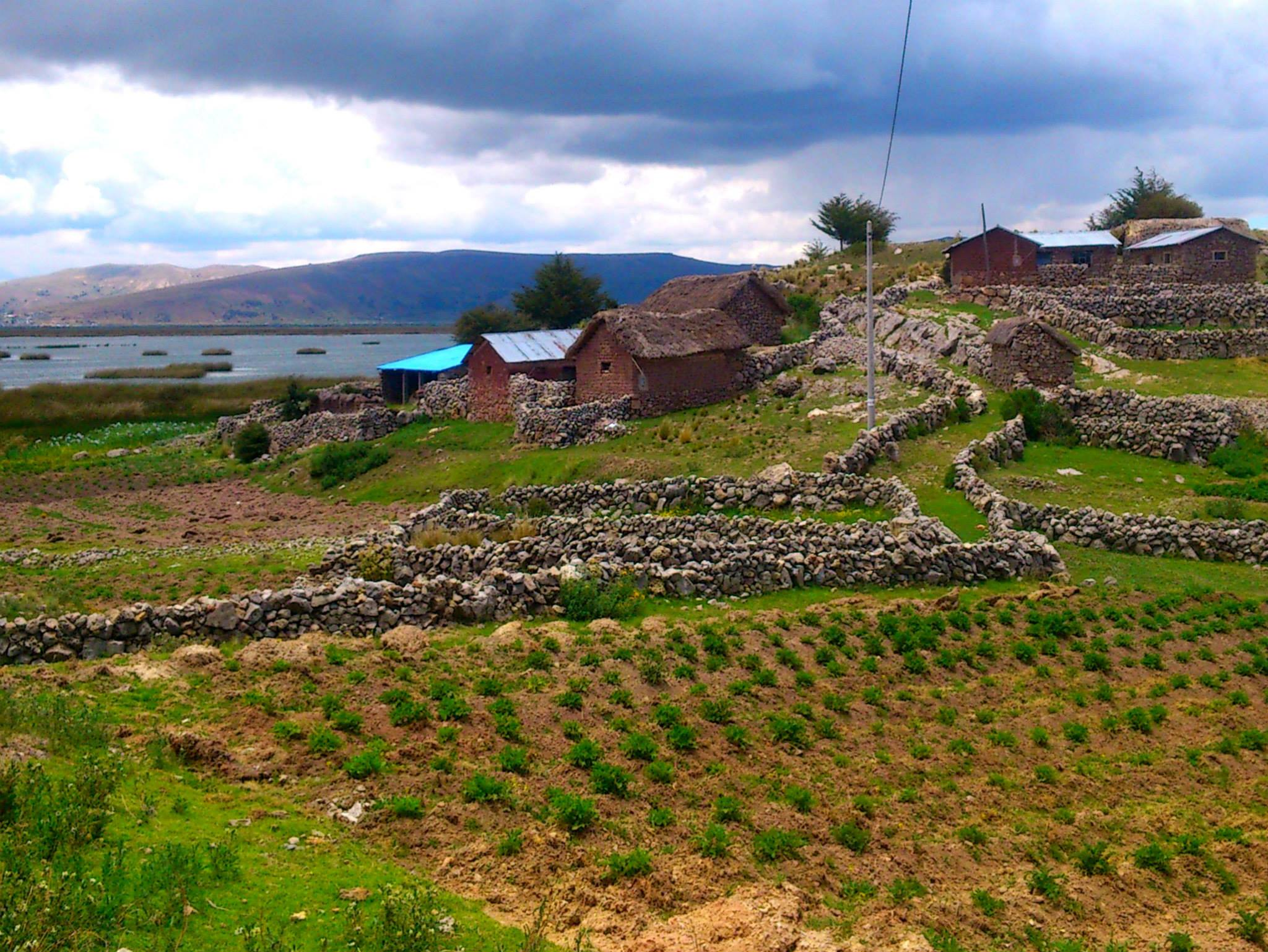 Platería Puno Peru